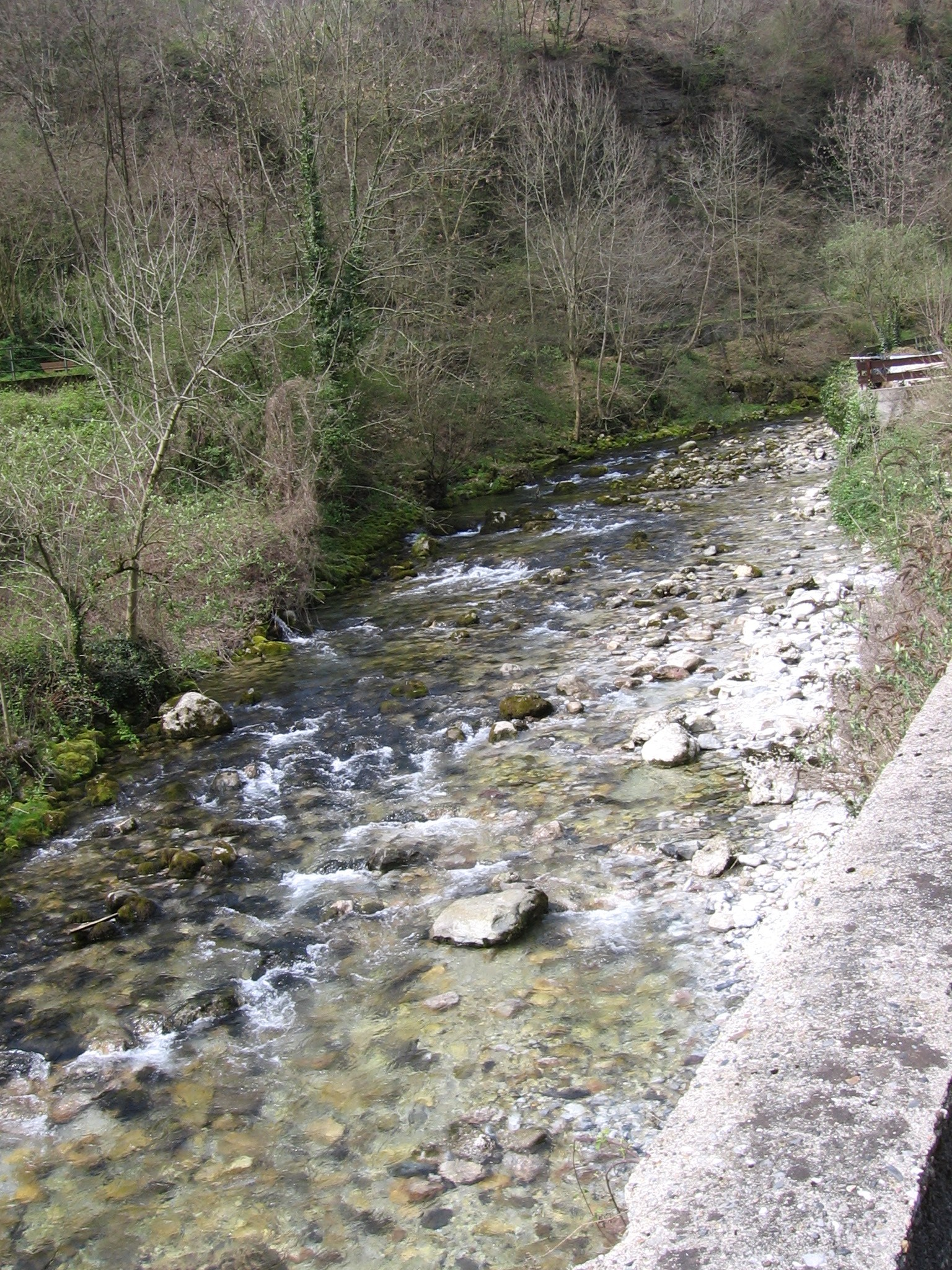 Ponte Nossa, Bergamo, Italia